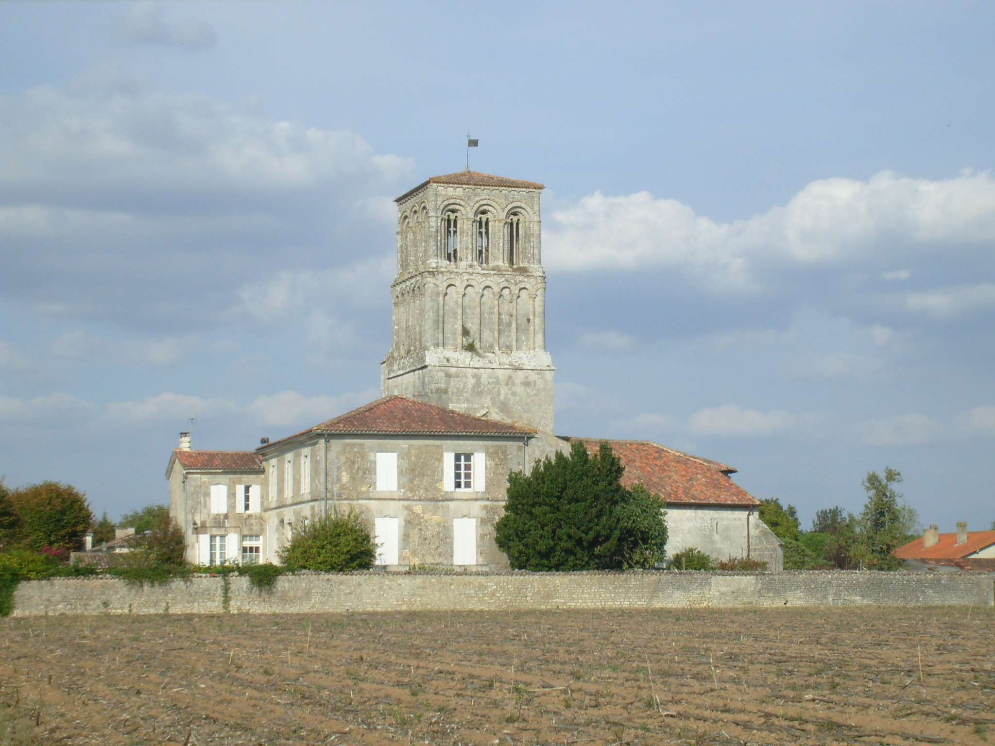 L'entrée du village de Thézac